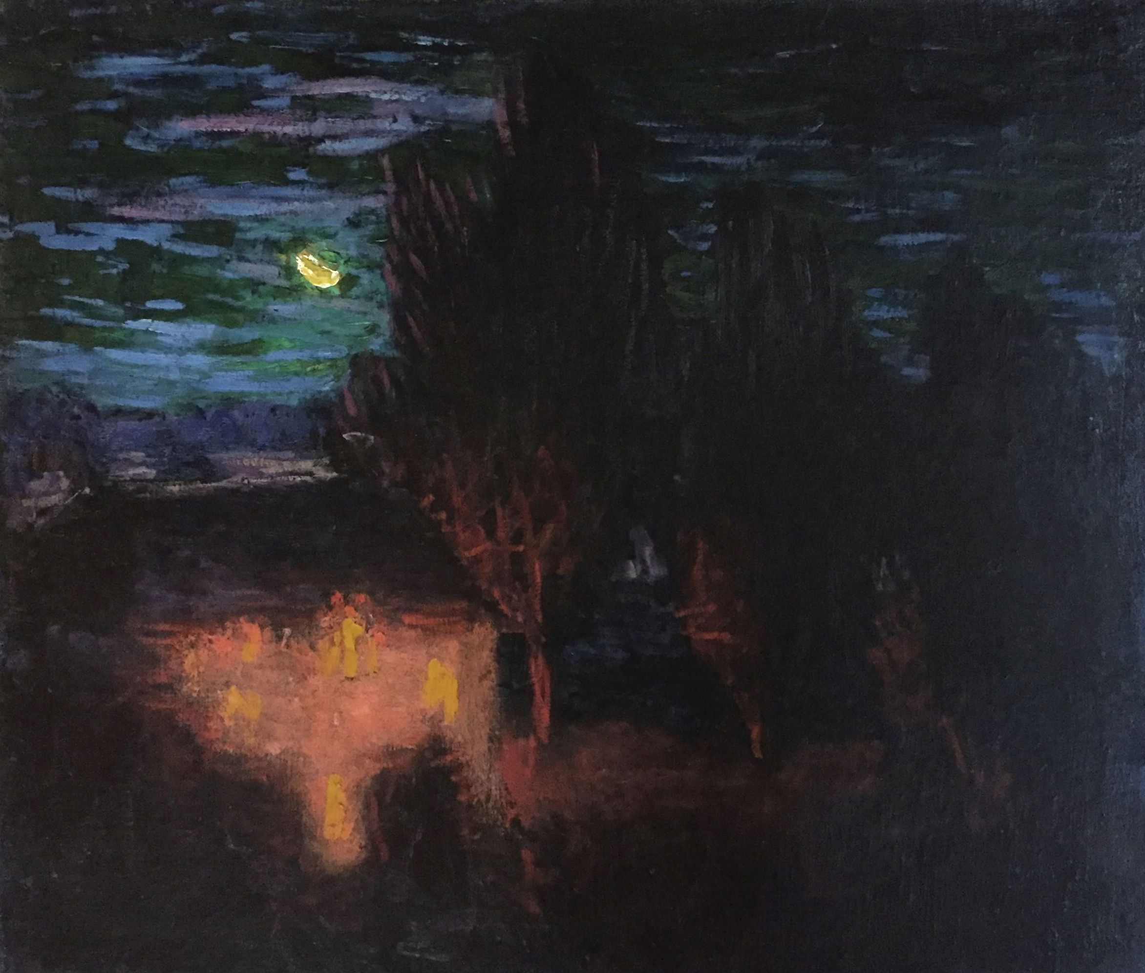 "Moonlit landscape with tall trees" is one of the most mystical paintings by Roderic O'Conor. For unknown reasons, after the artist's death the subject of the painting was identified as "The dance of the elves of Pont-Aven - Les Korrigans sous la lune)"